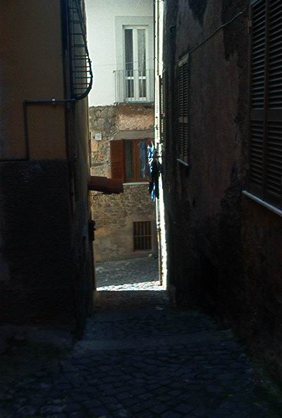 Via Fratelli Giani a Marino